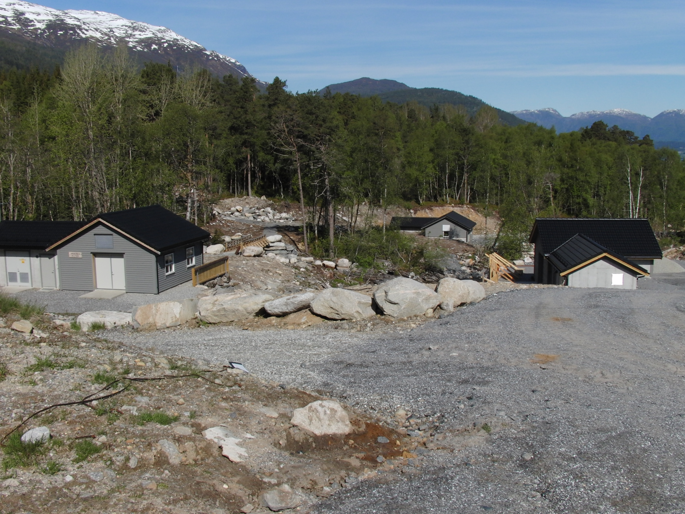 Tre kraftverk på en plass. Fra venstre: Breidalselva, Traudalen, og Langedalselva kraftverk.